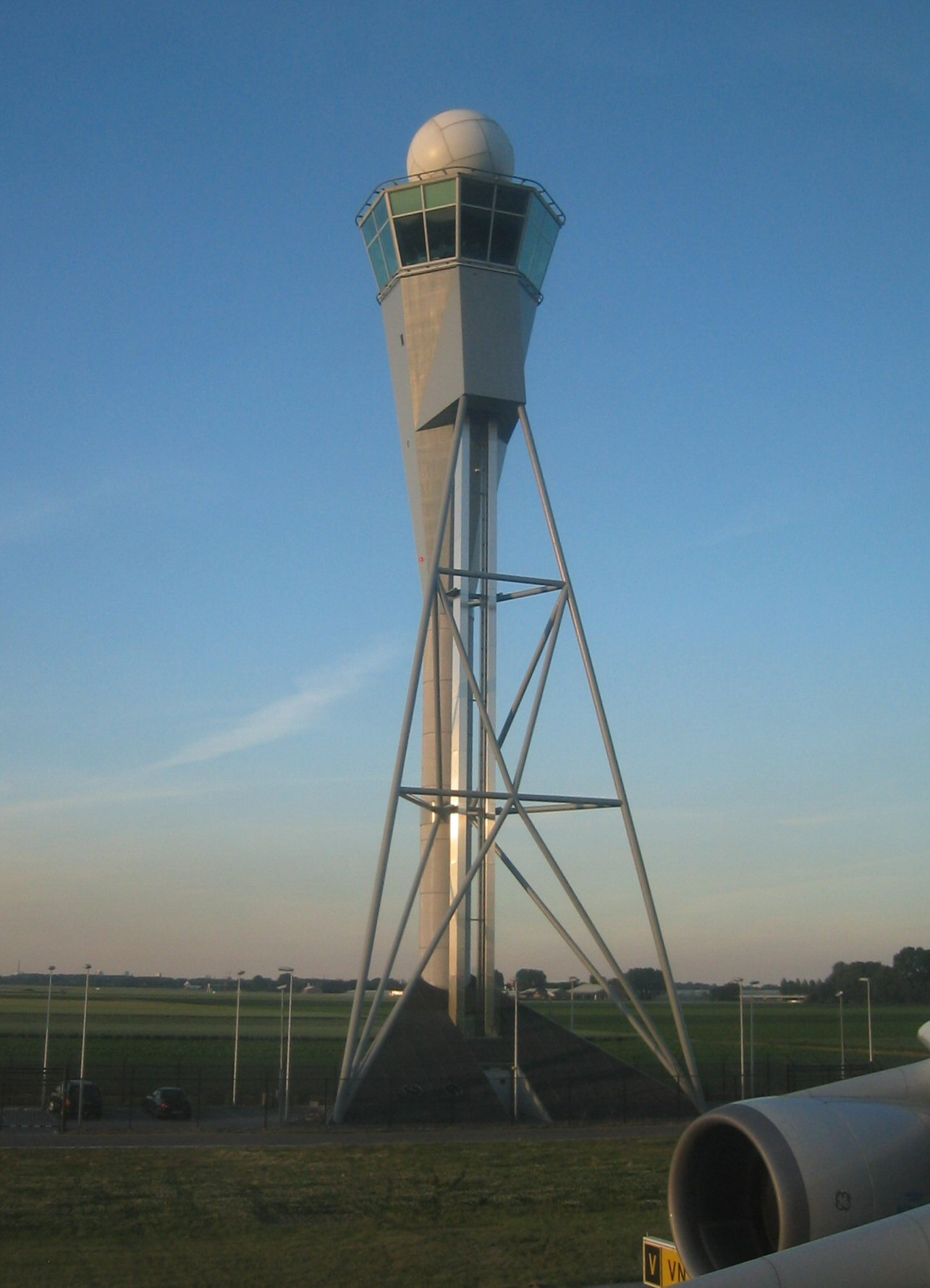 Verkeerstoren polderbaan Schiphol Foto door mijzelf genomen , vanuit KLM 747-400 City of Atlanta taxiend naar de polderbaan. Foto vrij te gebruiken.